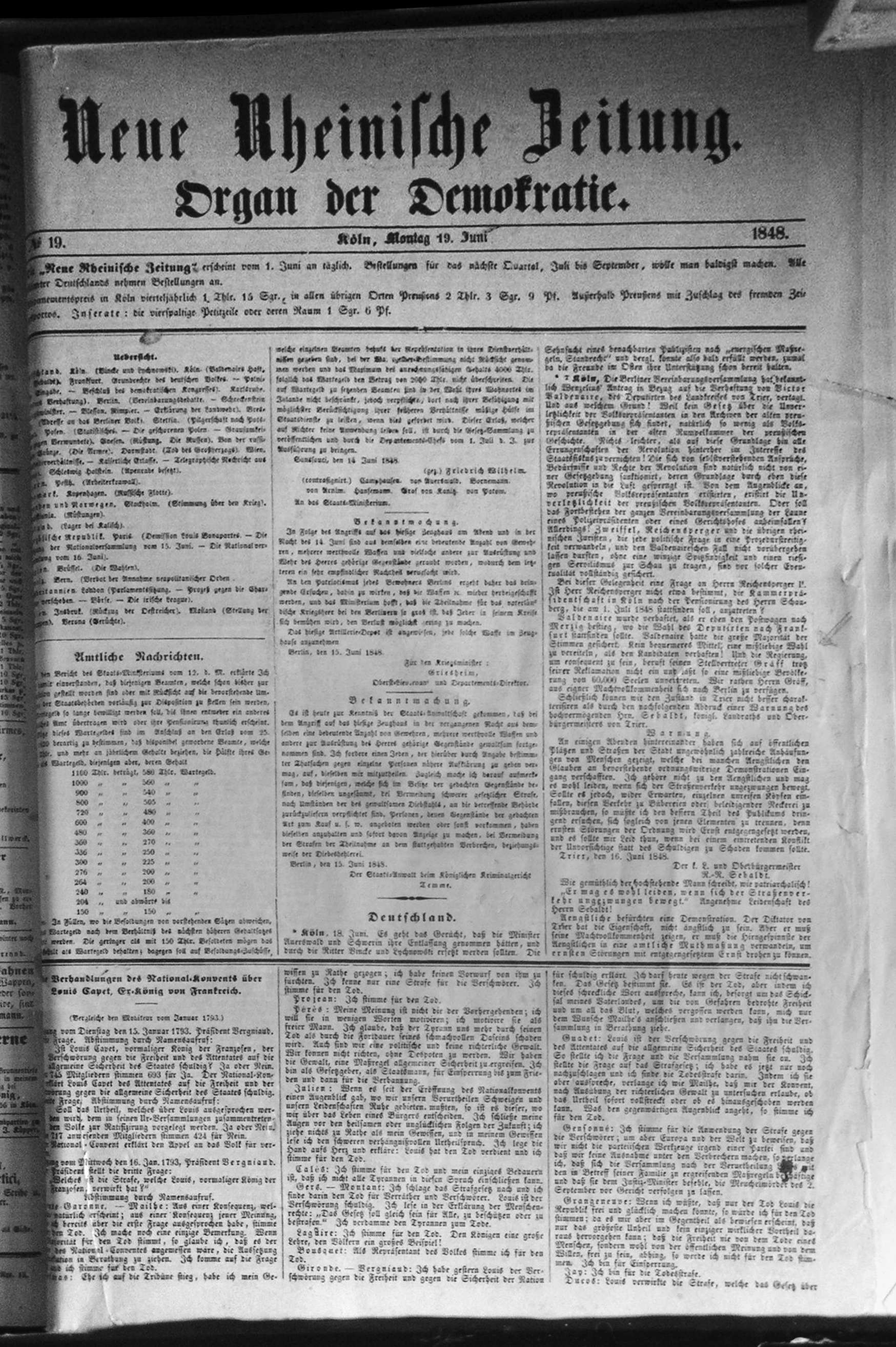 Neue_Rheinische_Zeitung (Aufgenommen im Volkskunde- und Freilichtmuseum Roscheider Hof)